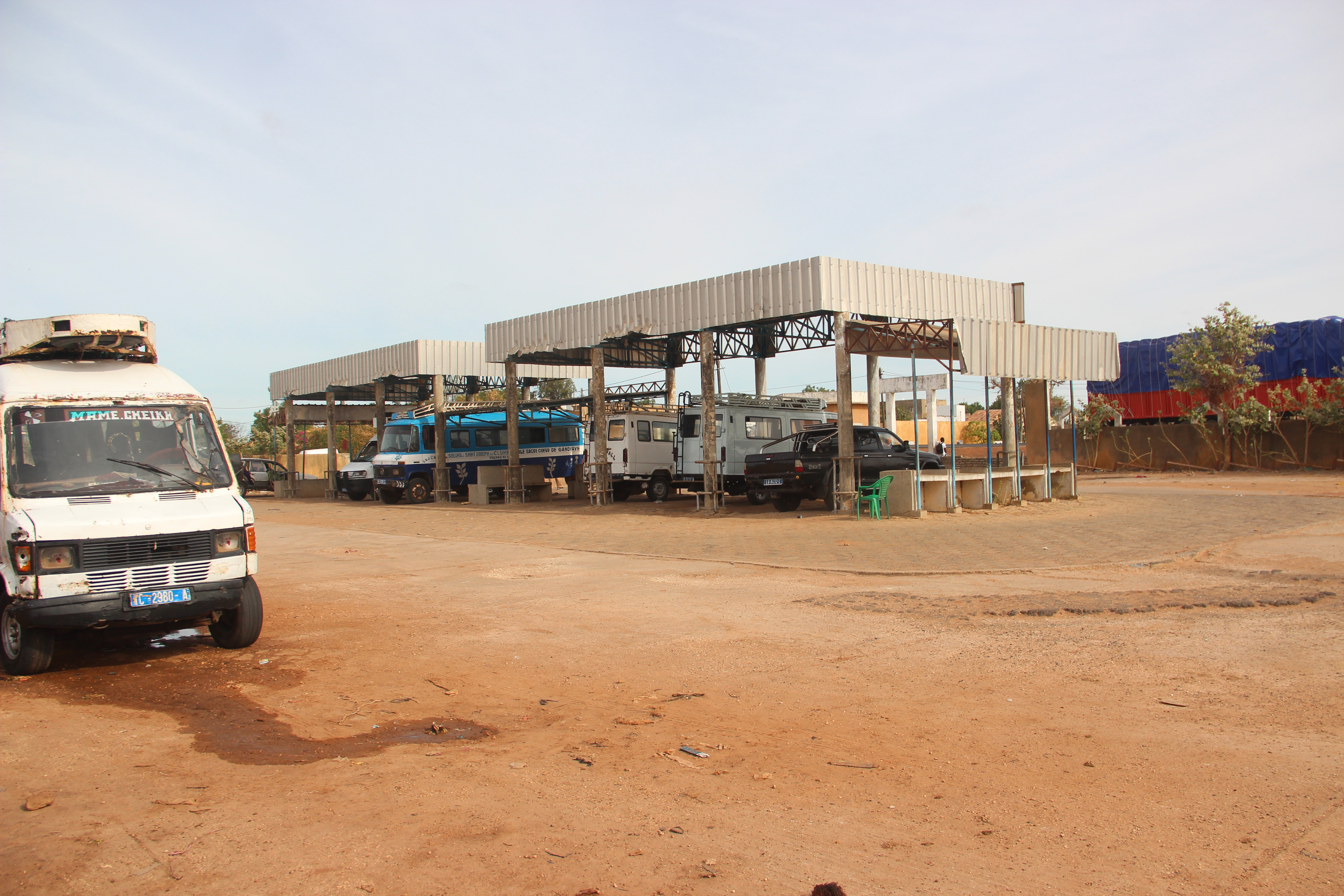 Gare routière de Gandiaye (Sénégal). This is an image with the theme "Africa on the Move or Transport" from: Senegal